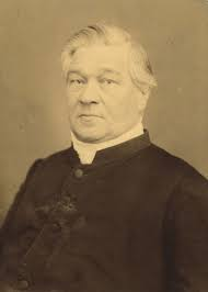 Julius Karl Arndt (* 26. März 1820 in Alsleben / Saale; † 12. Juni 1888 in Wernigerode) war ein evangelischer Pfarrer und Kirchenlieddichter.